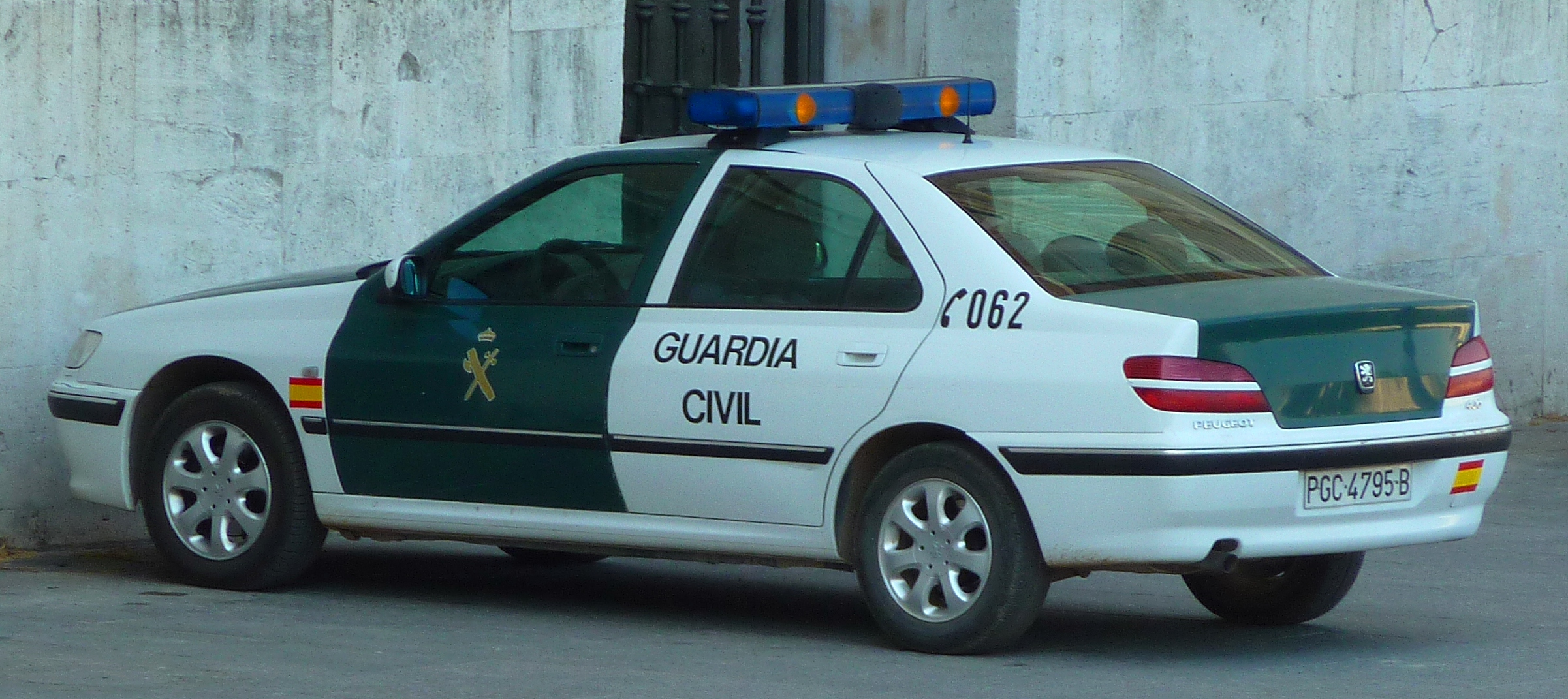 Peugeot 406 de la Guardia Civil.